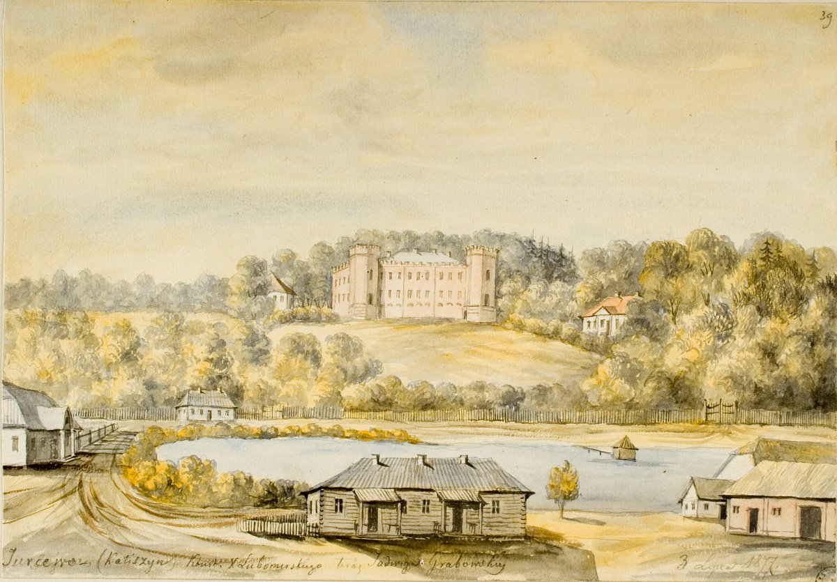 Беларуская (тарашкевіца): Юрцава (Jurcava), Кацішын (Kacišyn), сядзіба Любамірскіх (Lubamirski)